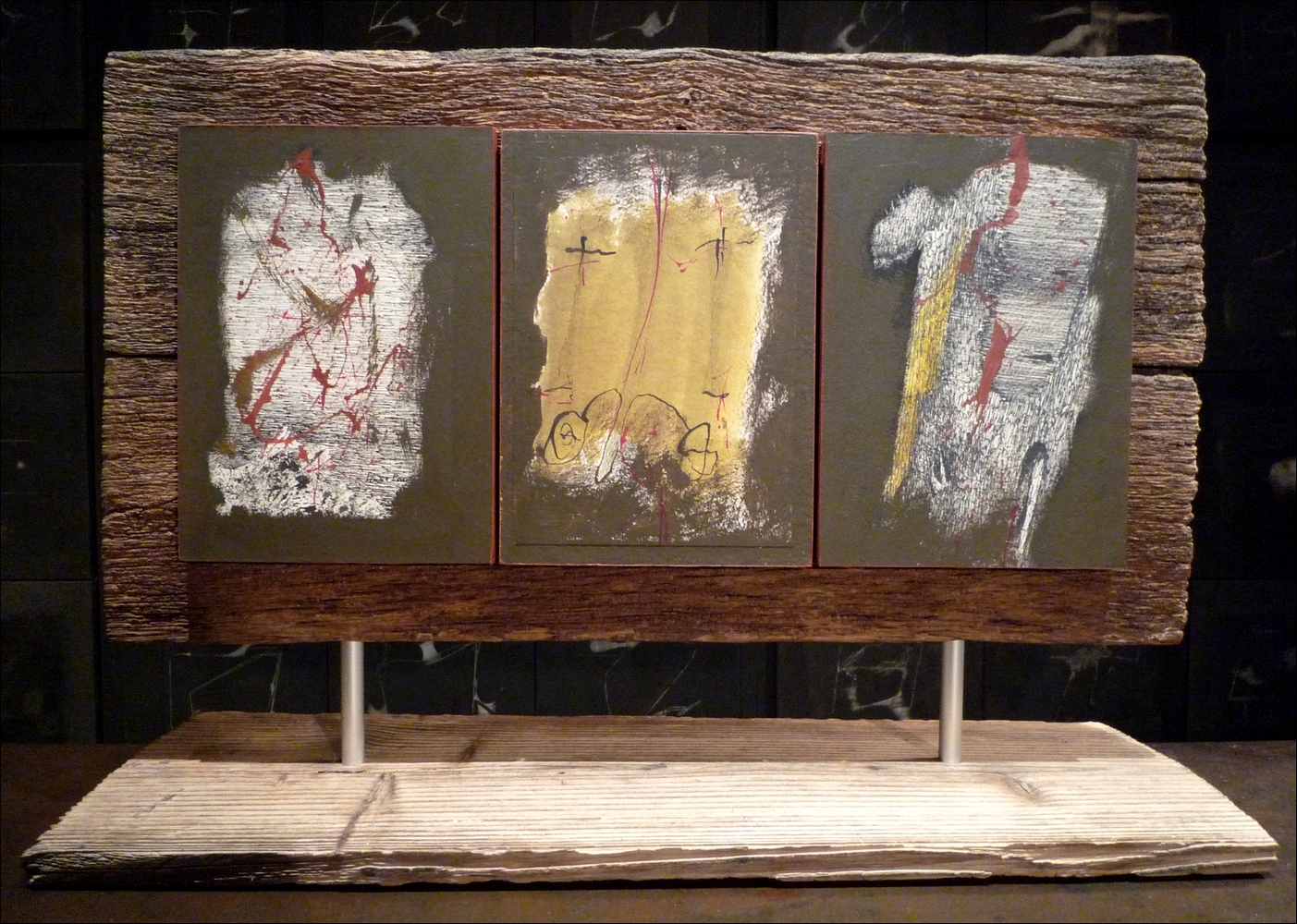 Pierre Saint-Paul et Philippe Henrion (2015), triptyque sur pied, 40 x 57 x 20, technique mixte